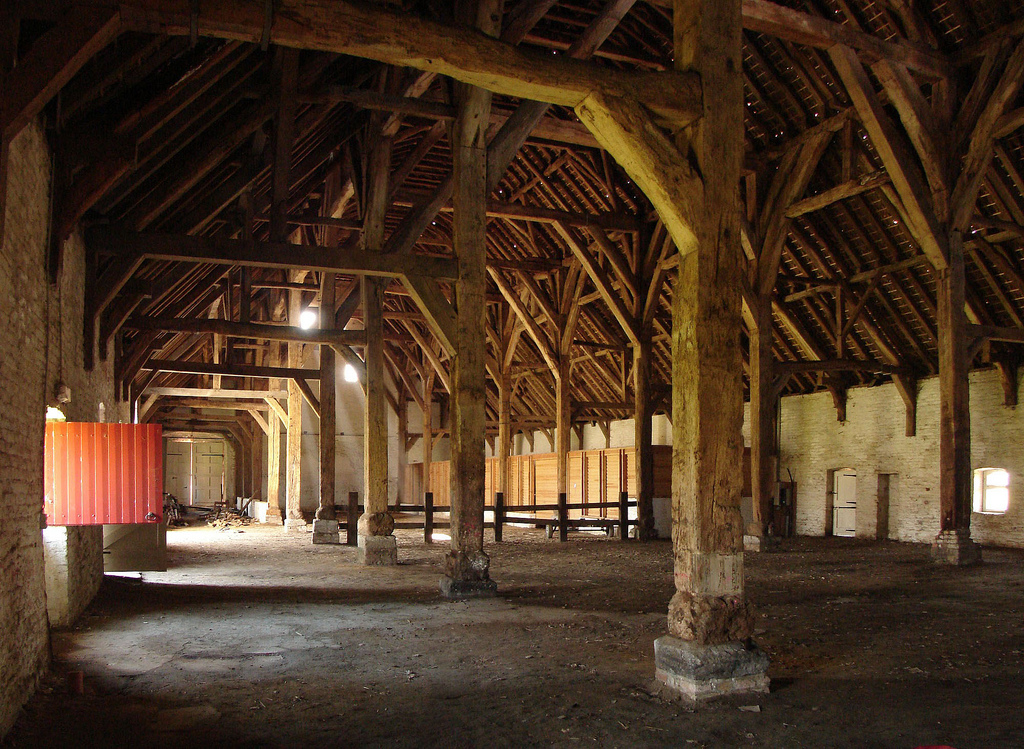 De grote schuur van de Abdij Ter Doest, te Lissewege